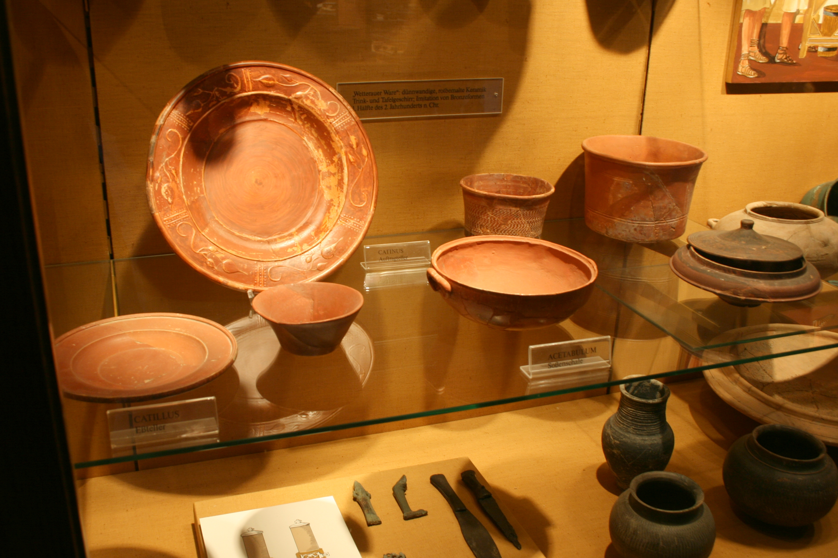 Wetterauer Ware - römische Keramik im Saalburgmuseum, Bad Homburg.